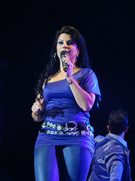 Olga Tañon LIVE